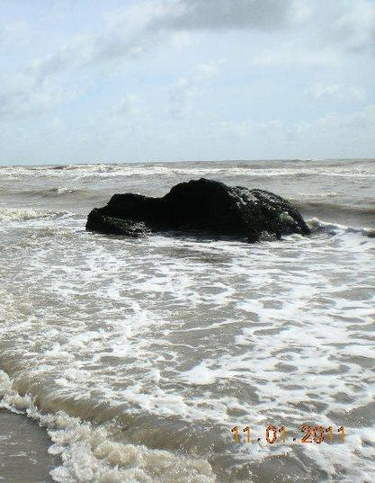 Costa azul, Restos encallados de la caldera del Vapor Mar del Sur